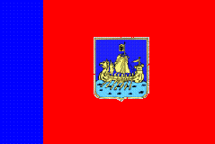 Флаг Костромской области 2000—2006 гг., Россия.